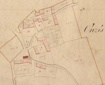 Oncès en el Cadastre Napoleònic del 1812 (Arxius Departamentals dels Pirineus Orientals)